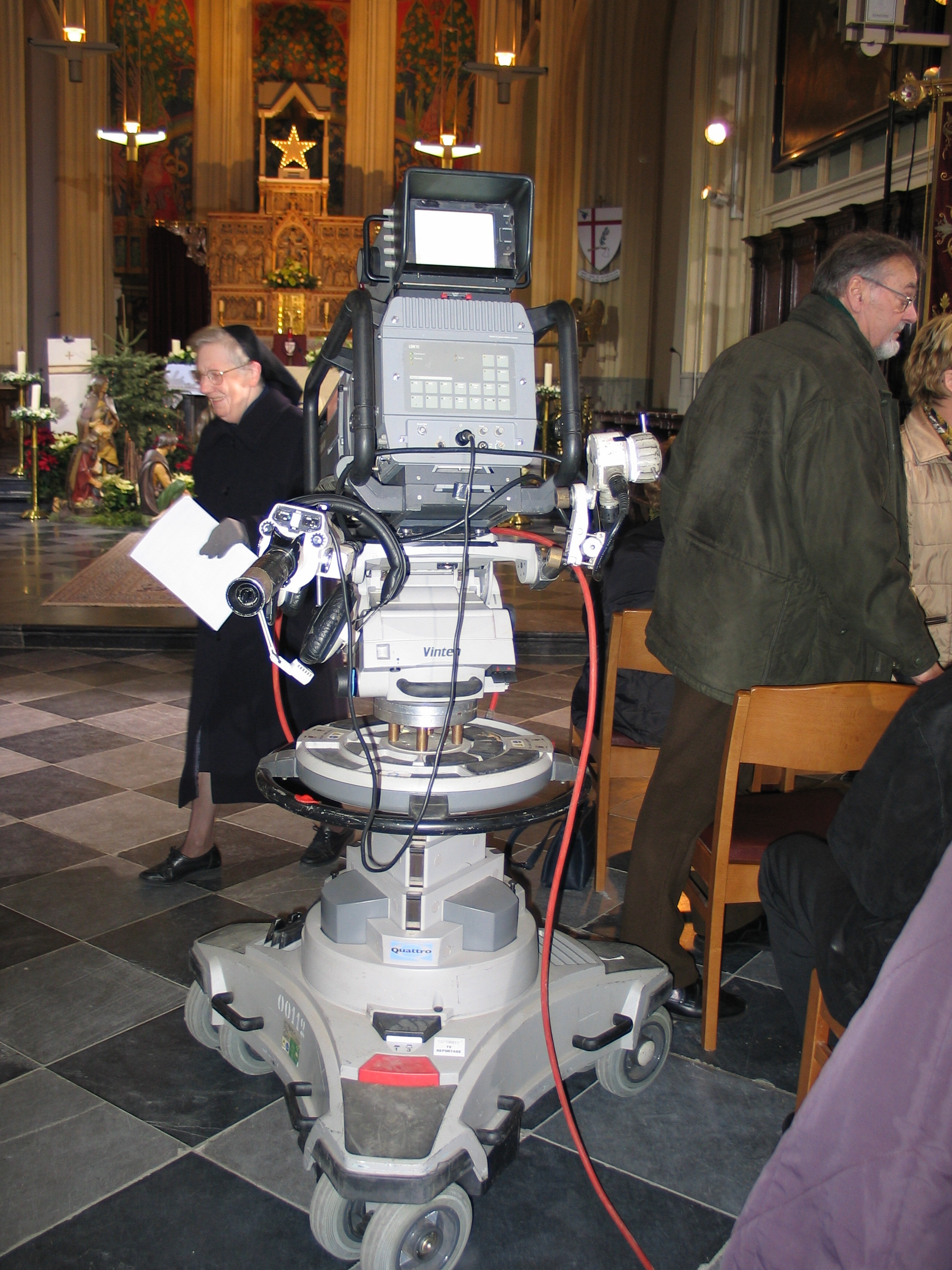 tv-camera